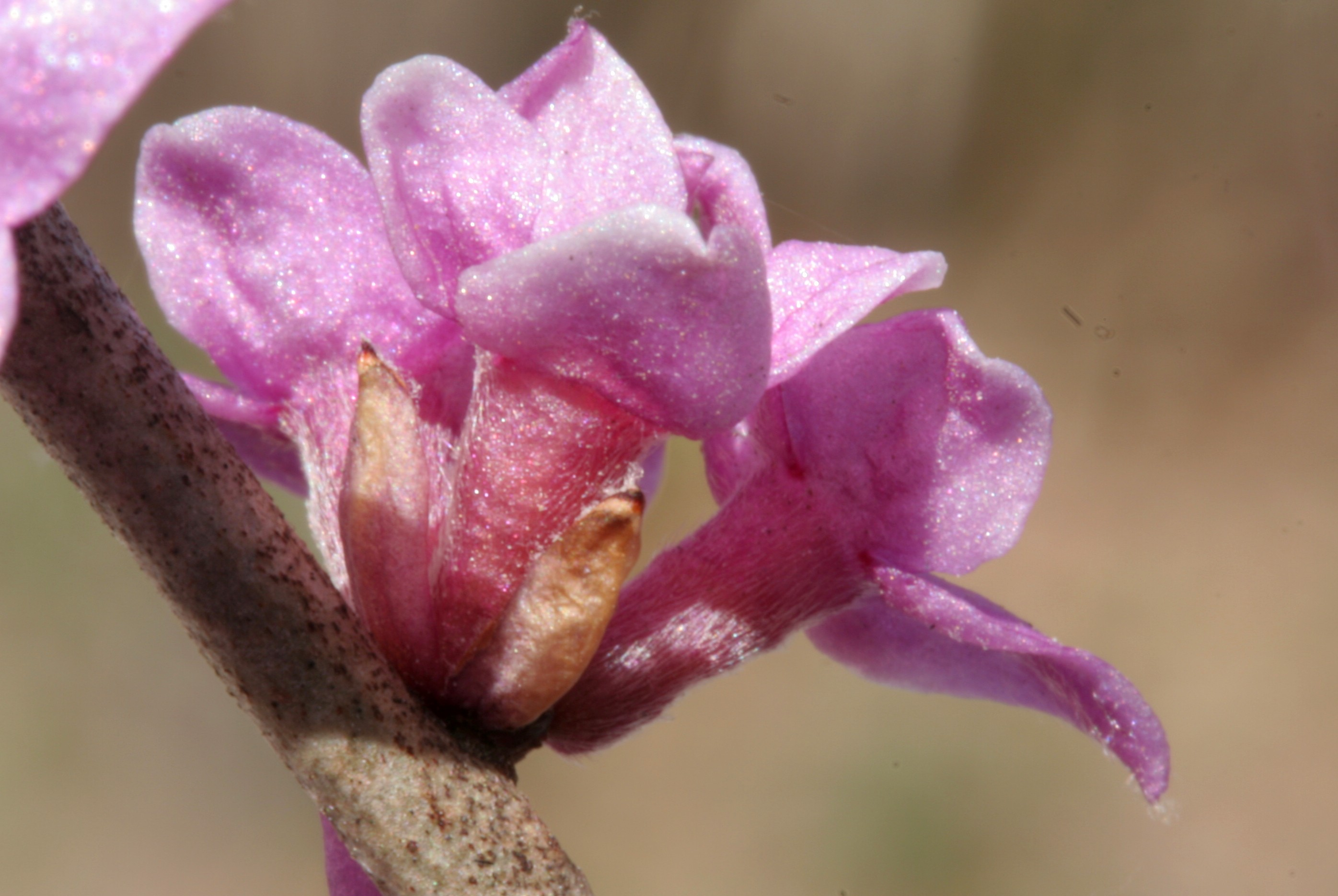 Daphne_mezereum (Dafne mezereo) Località : Pasa, Sedico (BL), 356 m s.l.m.